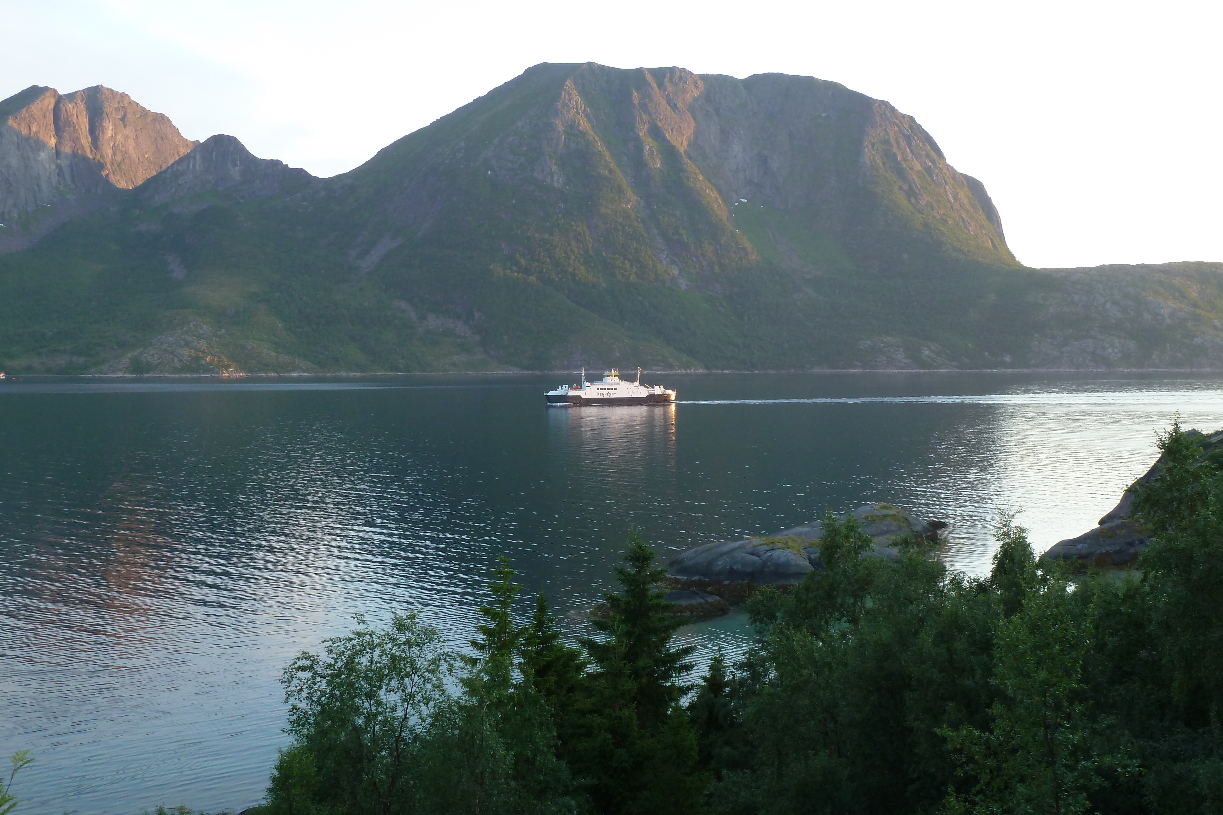 MF Rennesøy (IMO 8917340) i Økssundet, Hamarøy, på vei til Skutvik.